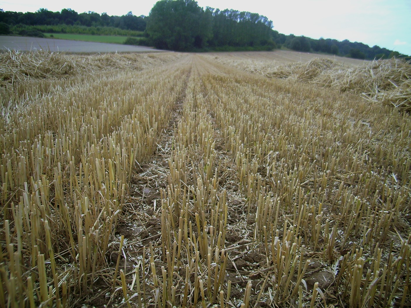 Getreide(Weizen)stoppel